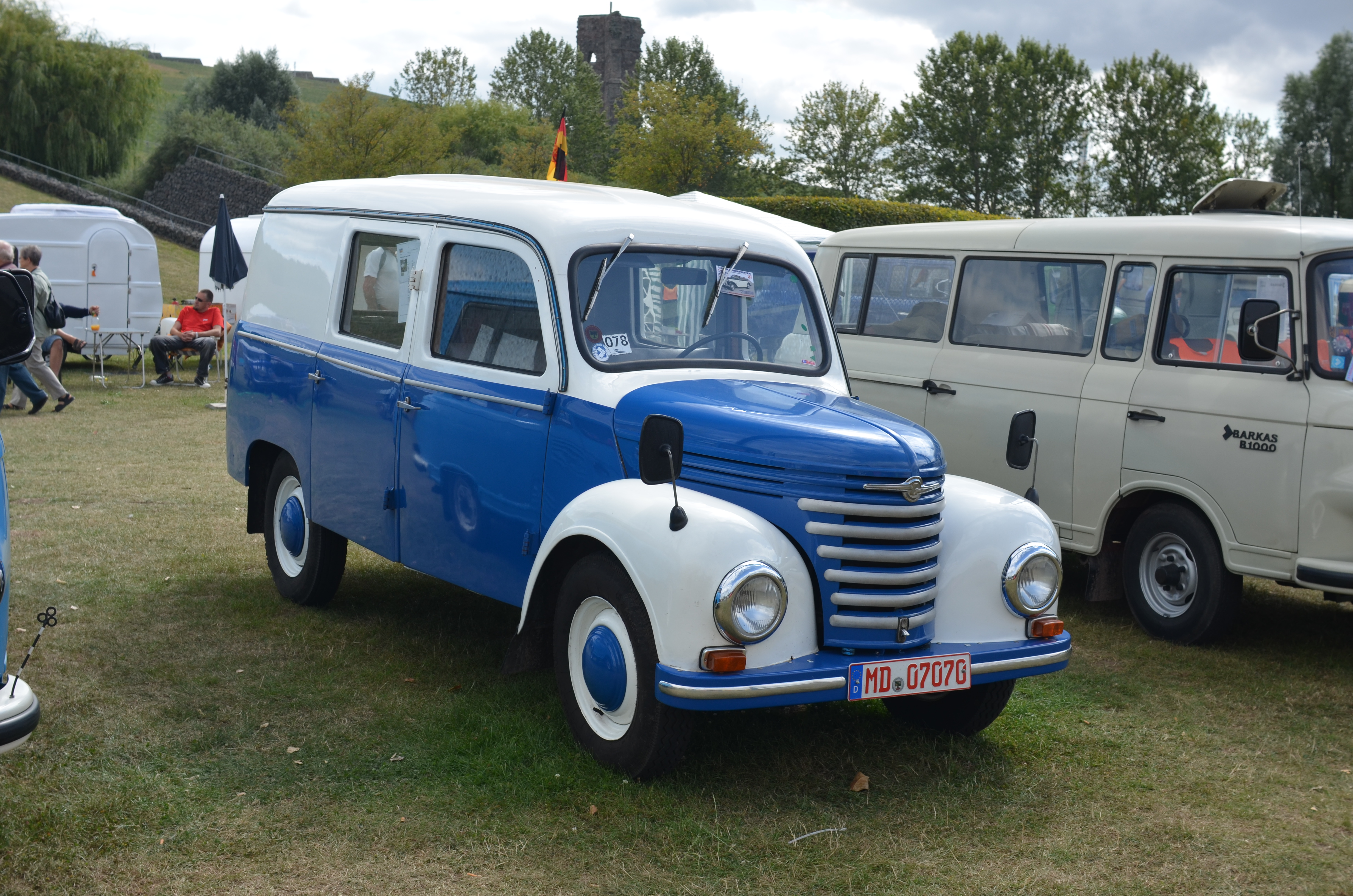 Framo